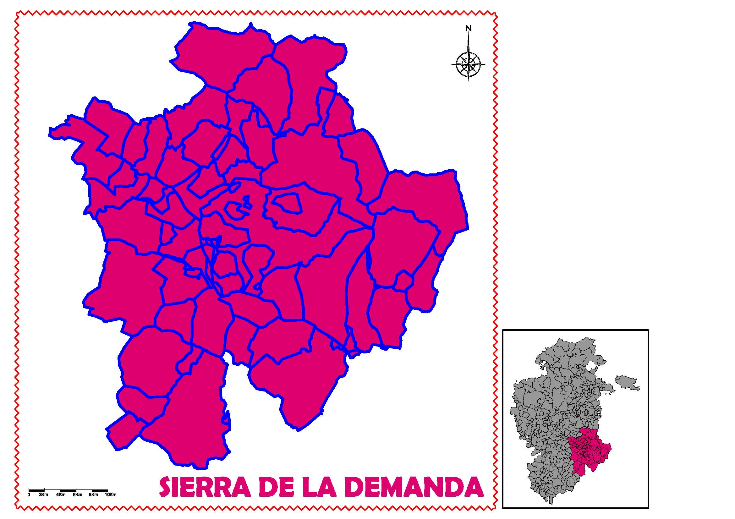 Ubicación de la comarca "Sierra de la Demanda" en la provincia de Burgos